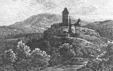 Ruine Lichtenburg bei Ostheim vor der Rhön, Radierung von C. Wagner